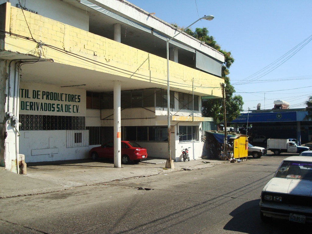 Edificio de la Unión Mercantil de Productores de Coco y sus Derivados S.A. en Acapulco donde el 20 de agosto de 1967 se escenificó la cruenta masacre de copreros.